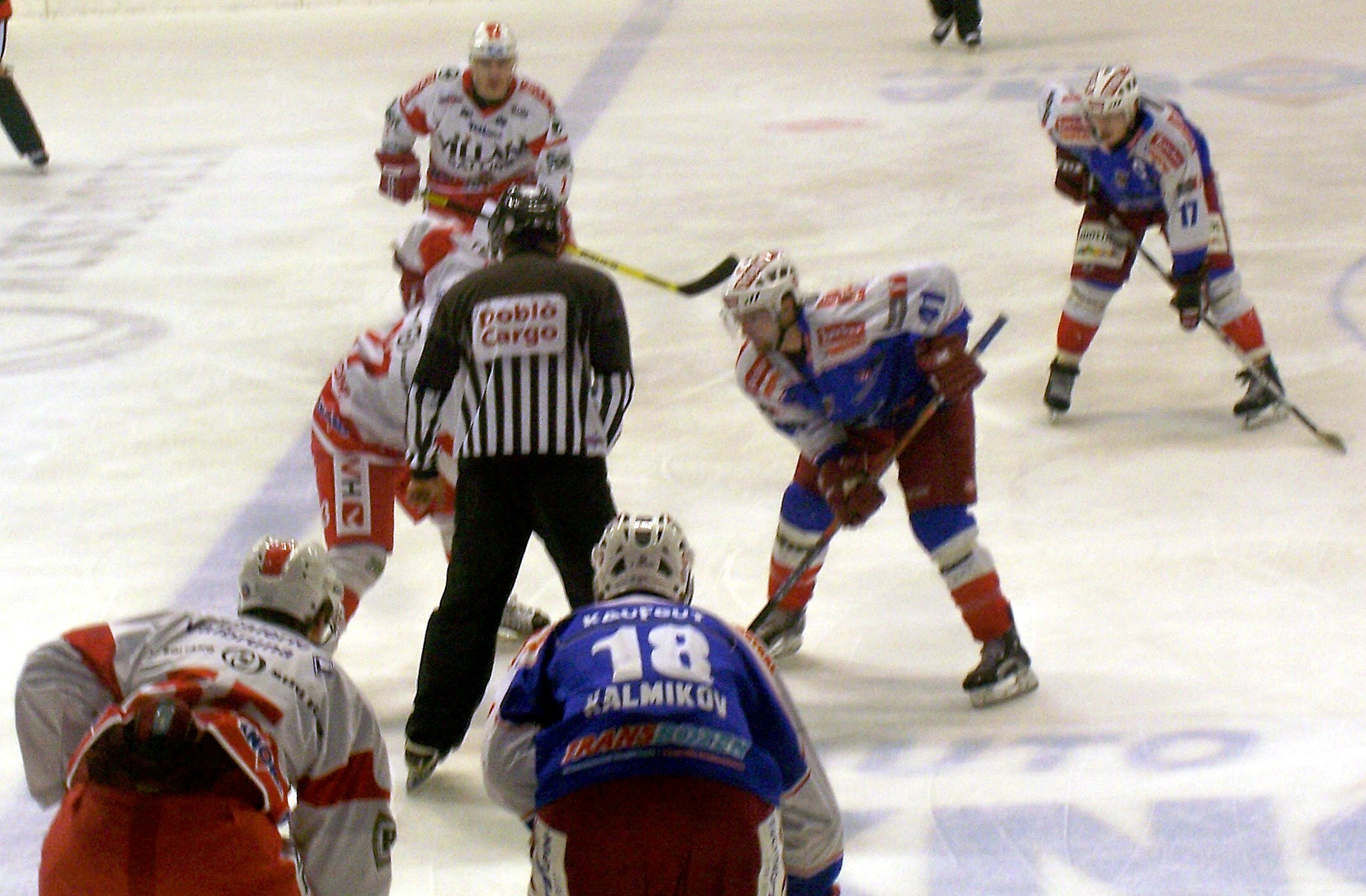 Ingaggio fra Luca Ansoldi (Renon, in maglia blu) e Flavio Faggioni (Bolzano, in maglia biancorossa) nella partita HC Bolzano-SV Renon 6-2 del 30 dicembre 2006